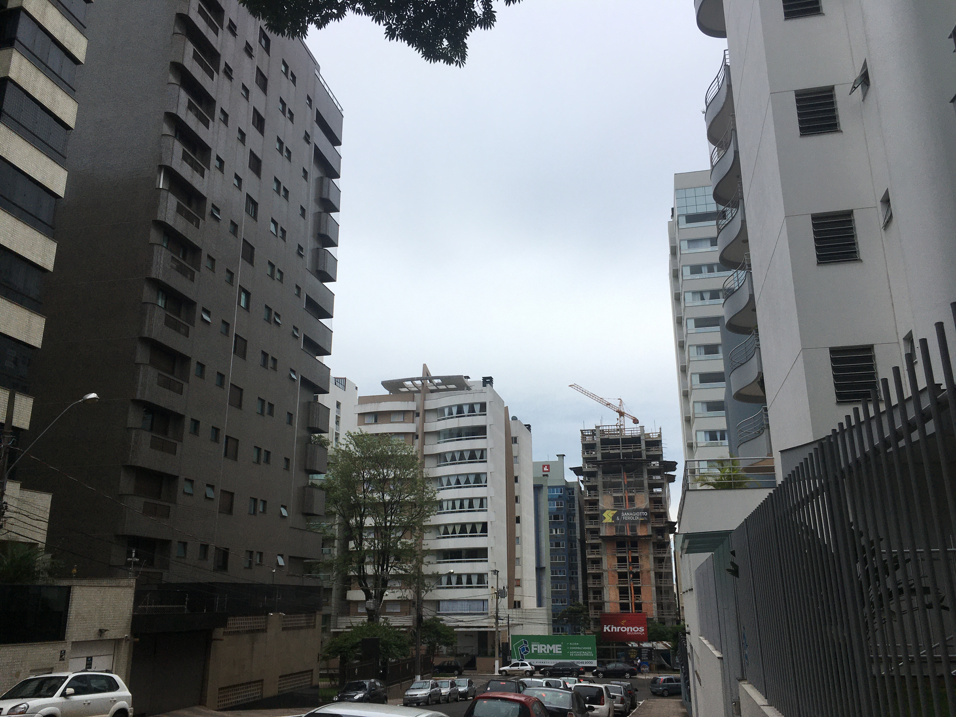 Edifícios numa zona nobre do centro da cidade.